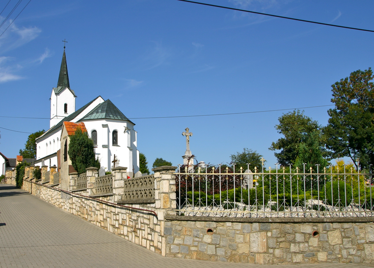 Olbrachcice (dodatkowa nazwa w j. niem. Olbersdorf) – wieś w Polsce położona w województwie opolskim, w powiecie prudnickim, w gminie Biała.